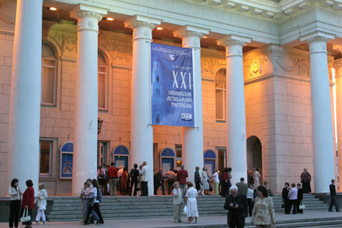 Саратовский академический театр оперы и балета